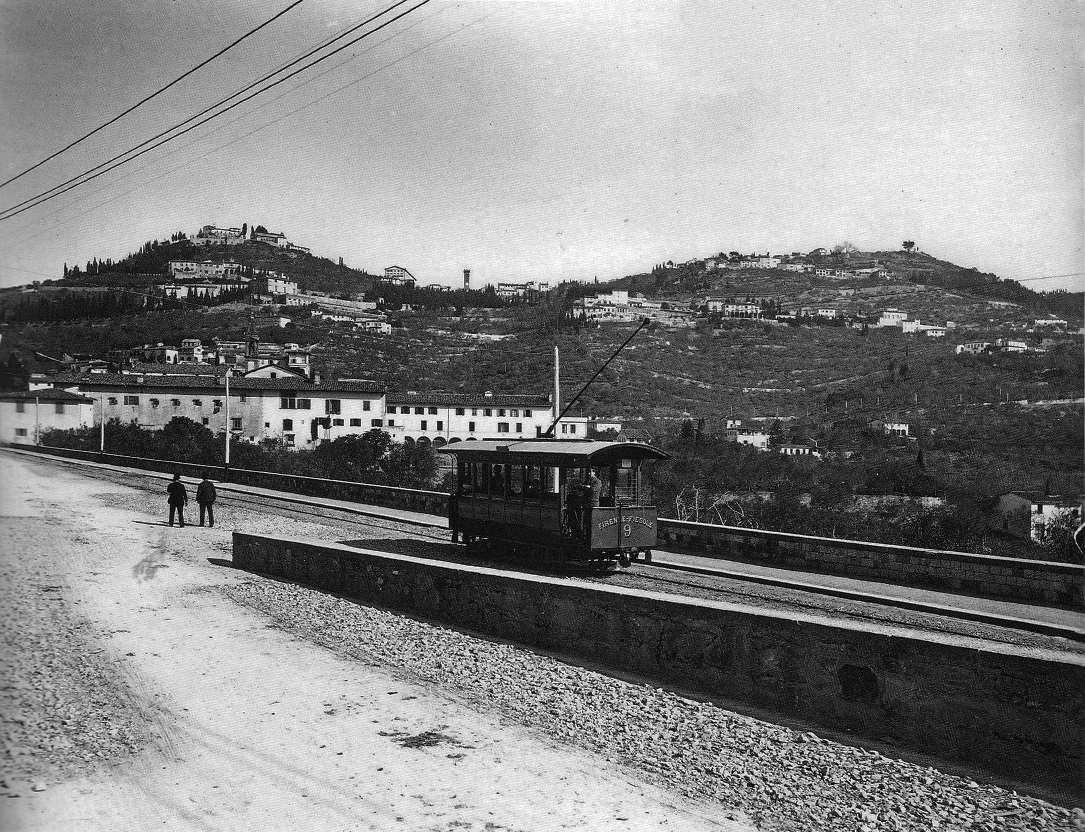 Vettura della linea tranviaria Firenze-Fiesole nei pressi di San Domenico